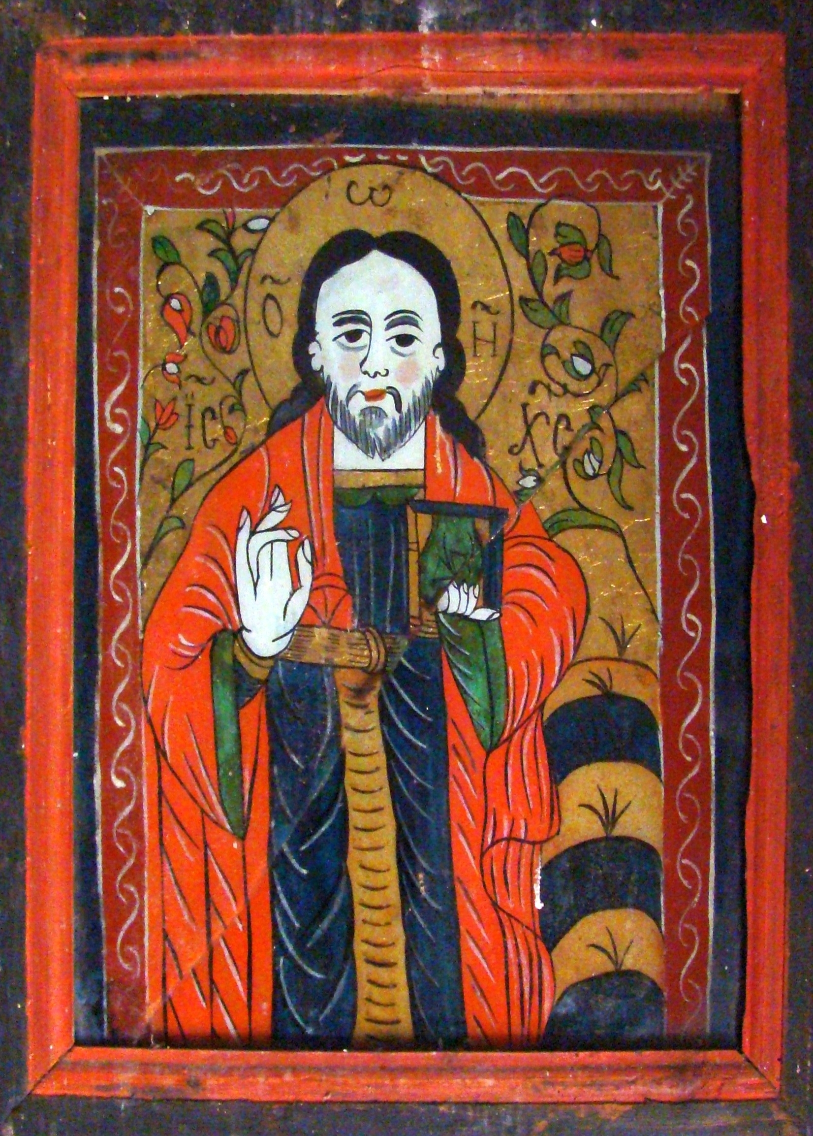 Dealu Geoagiului, județul Alba